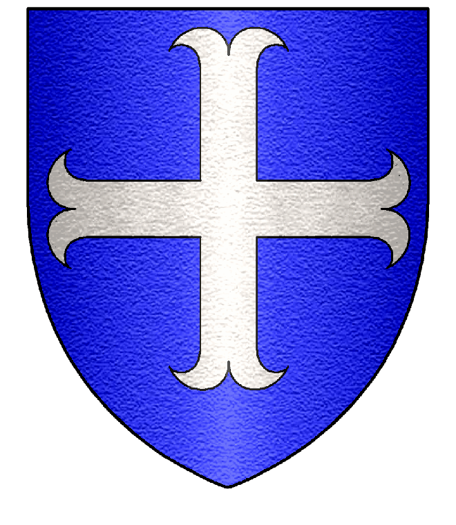 Famille de Charry des Gouttes : D'azur à la croix ancrée d'argent.